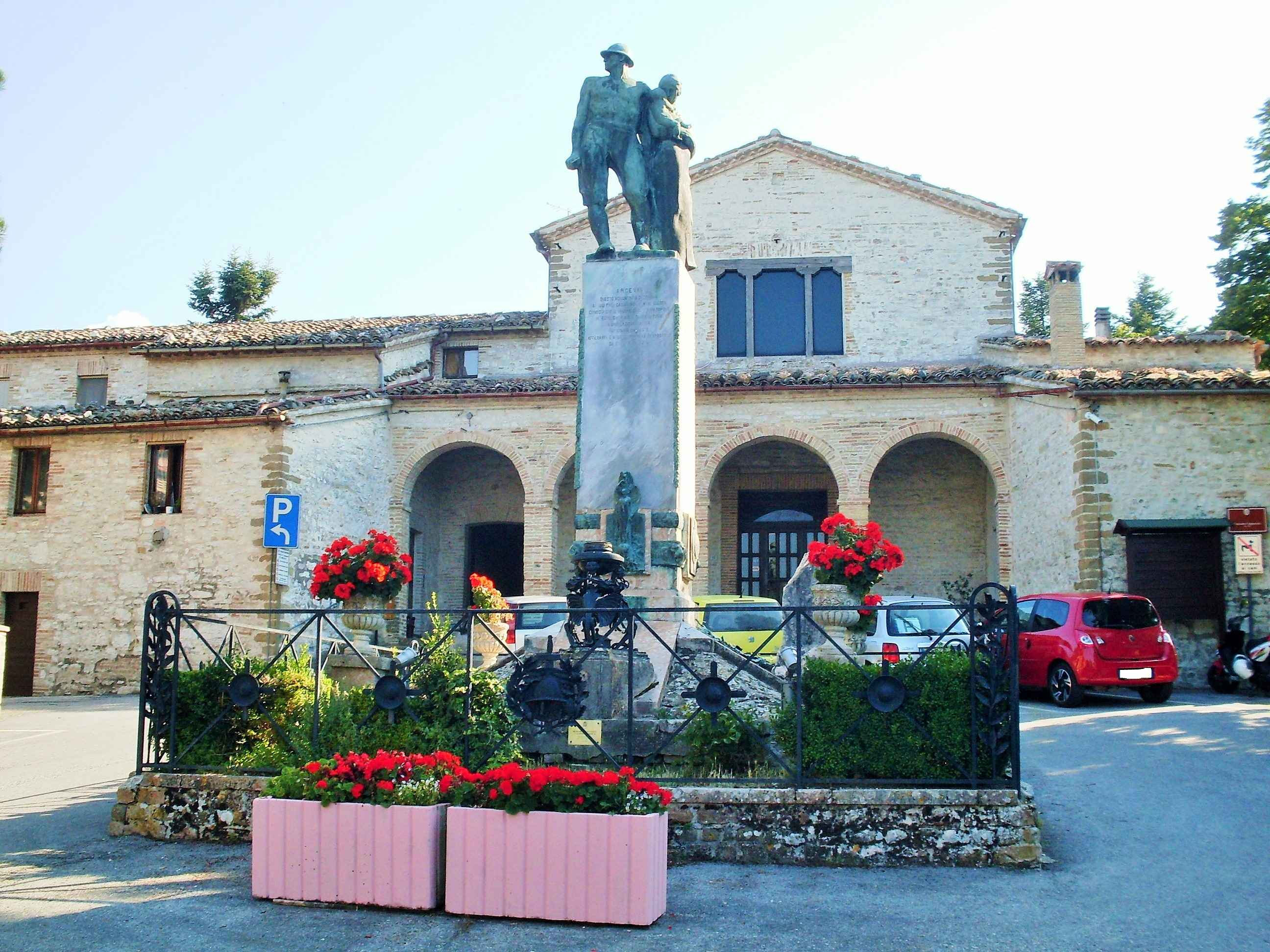 Arcevia monumento ai caduti Grande Guerra e ingresso Parco